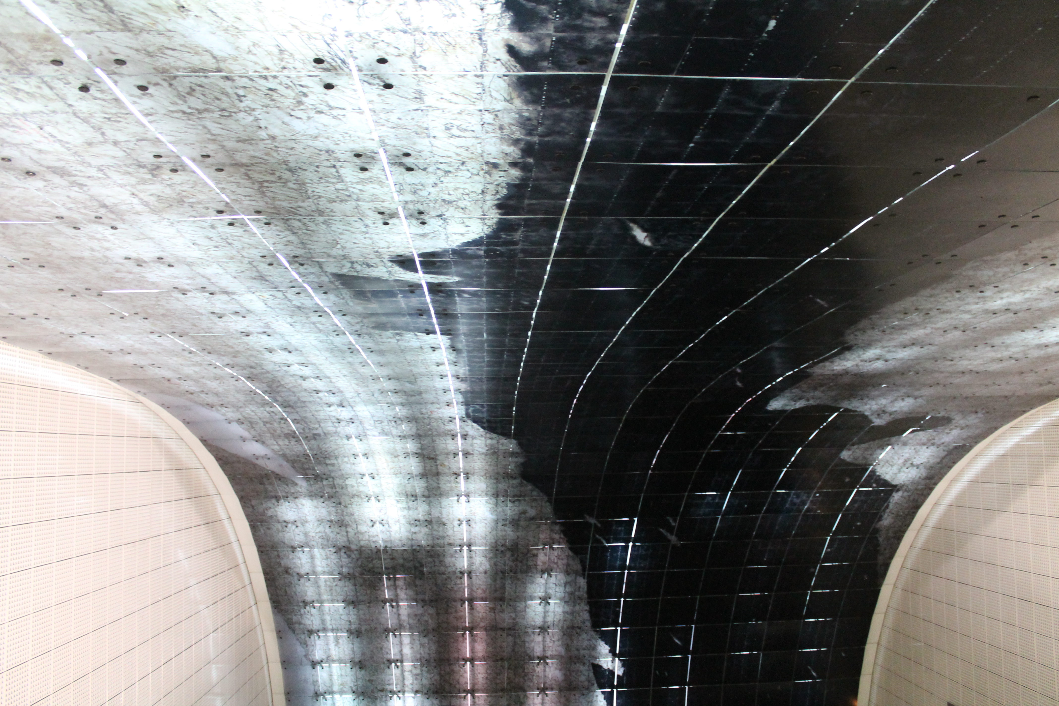 La voute de la station des Carmes, Ligne B du métro de Toulouse.